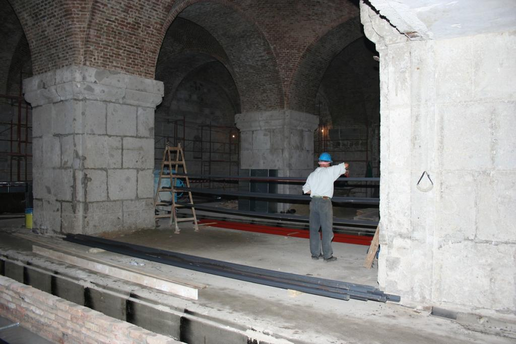 A Prímás Pince felújítása